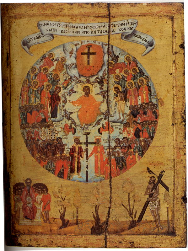 Все святые (на обороте Воздвижение) Век:XVII Место создания: Греция Место хранения: Афон, монастырь Пантократор Размер: 31 х 24,5 см